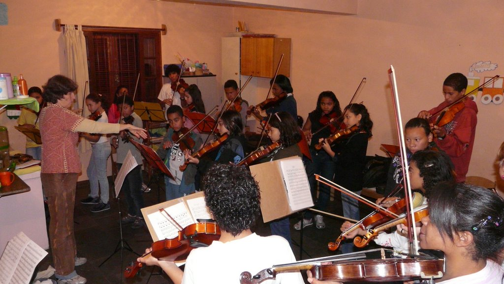 Das Musikorchester von Monte Azul